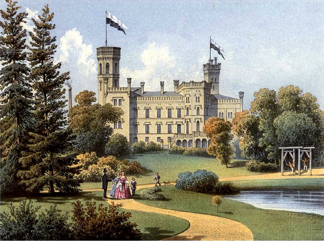 Schloss Schlagenthin, Kreis Arnswalde, Provinz Brandenburg, Lithografie aus dem 19. Jahrhundert